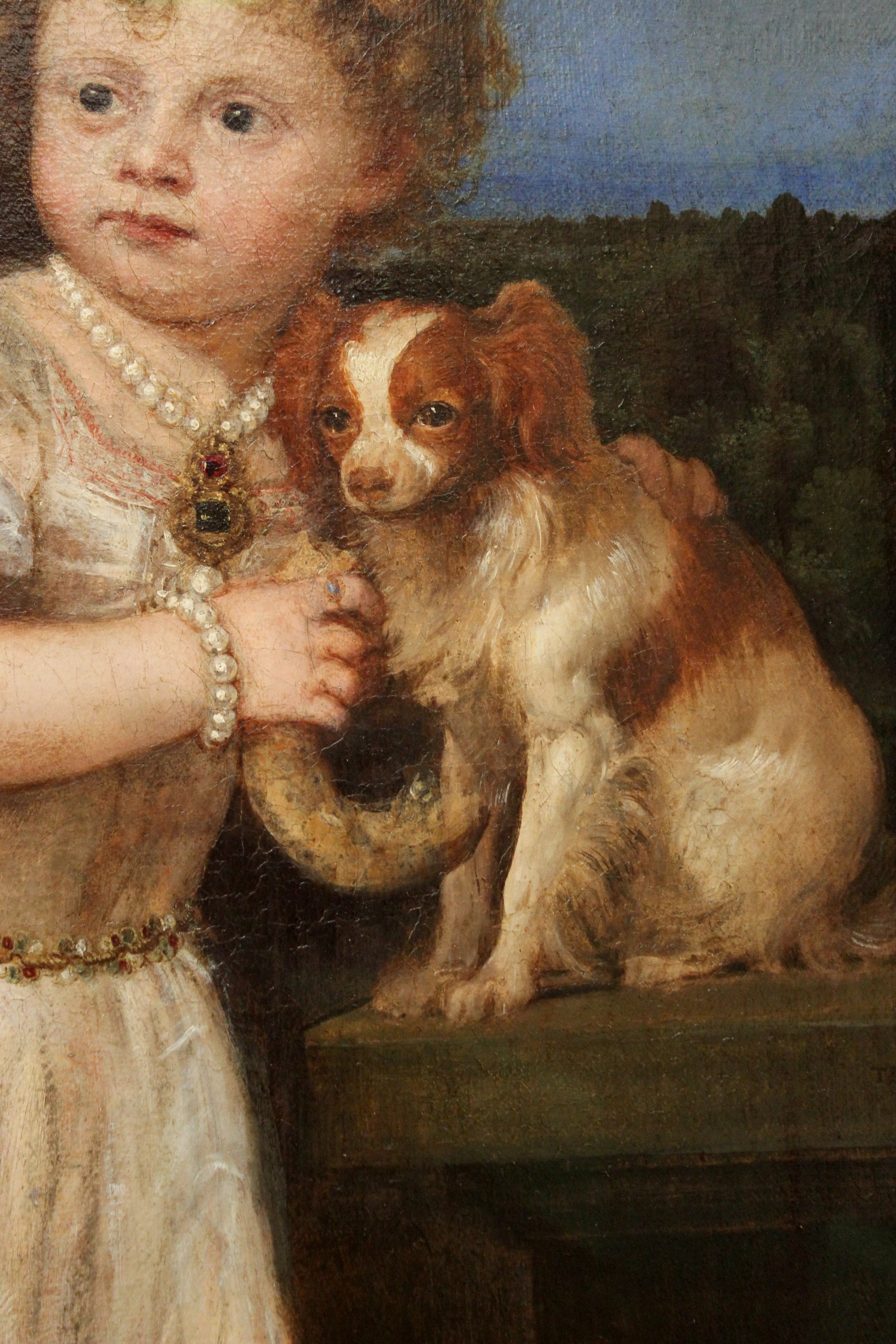 Tiziano, retrato de Clarissa Strozzi.